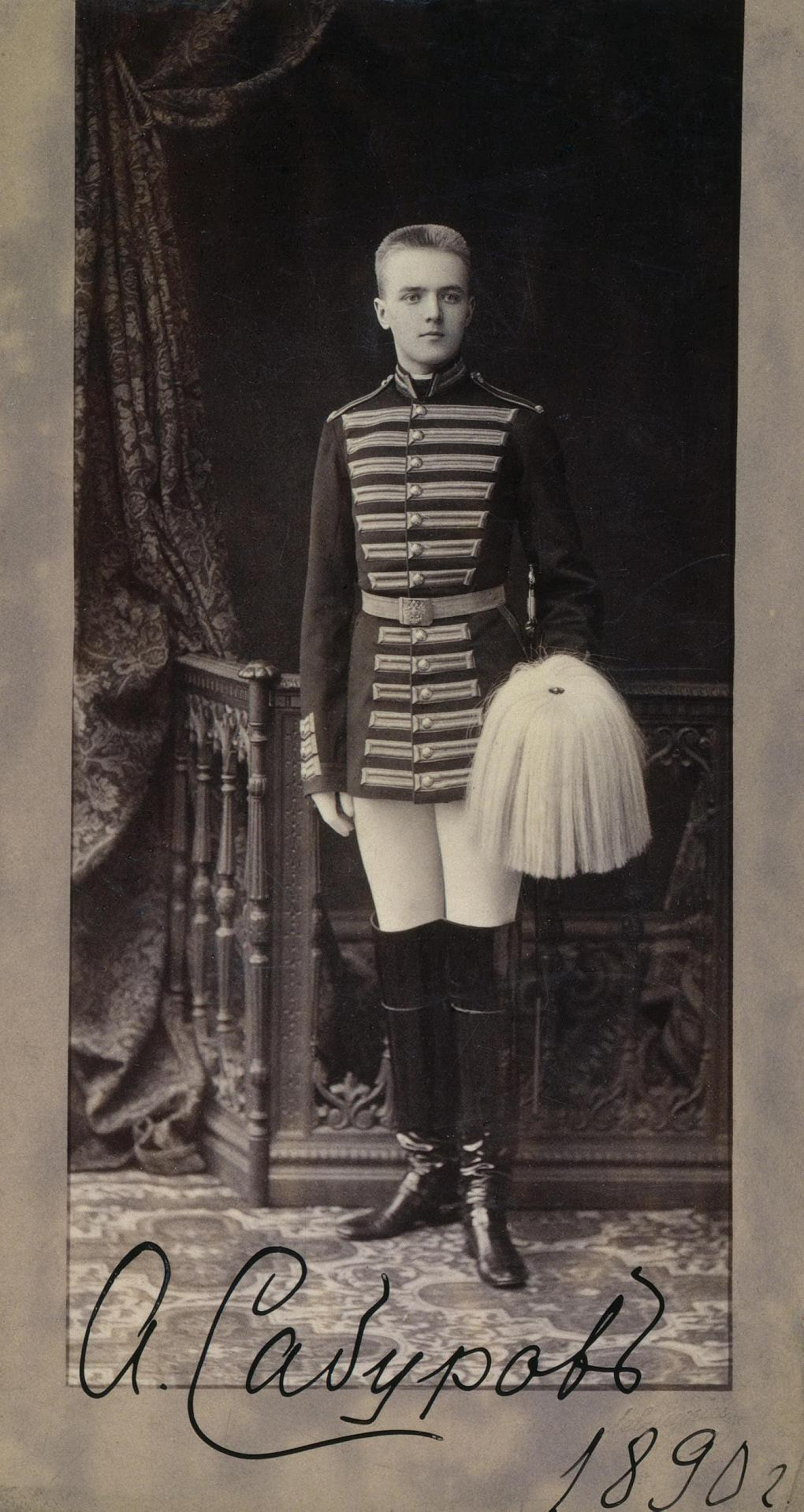 Портрет камер-пажа Сабурова. Фотография: альбуминовый отпечаток, фирменное паспарту. 16х11 см